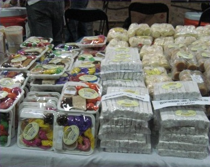 Huevitos de Leche, Bocadillos y manjar Blancos